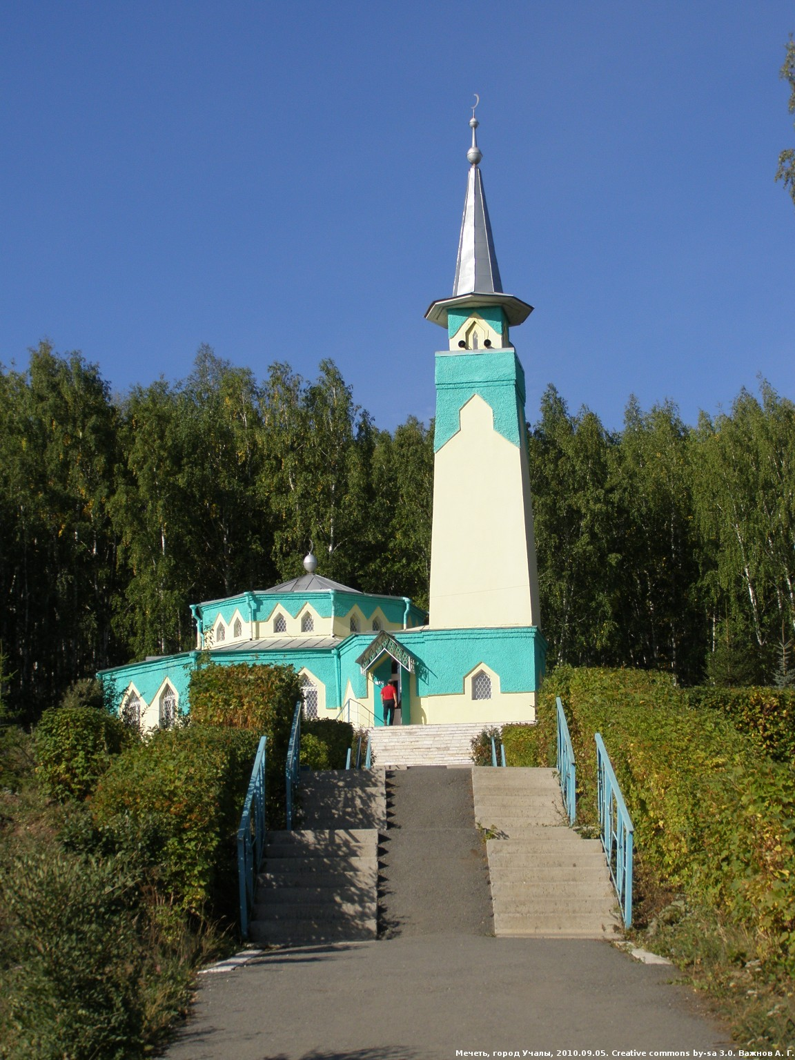 Мечеть, город Учалы